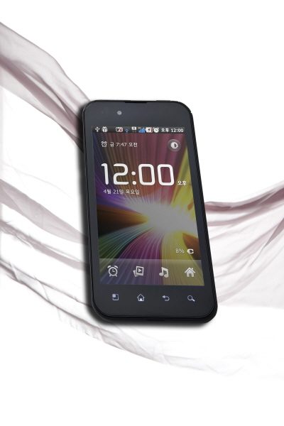 LG전자,가장 밝은 스마트폰 '옵티머스 블랙' 출시 LG전자가 이번 주말부터 KT를 통해 세계 최고 밝기인 700 니트를 구현하는 '옵티머스 블랙'을 출시한다. 이 제품은 야외 시인성과 가독성이 탁월하며, 초경량 초슬림 디자인의 스타일도 갖췄다.